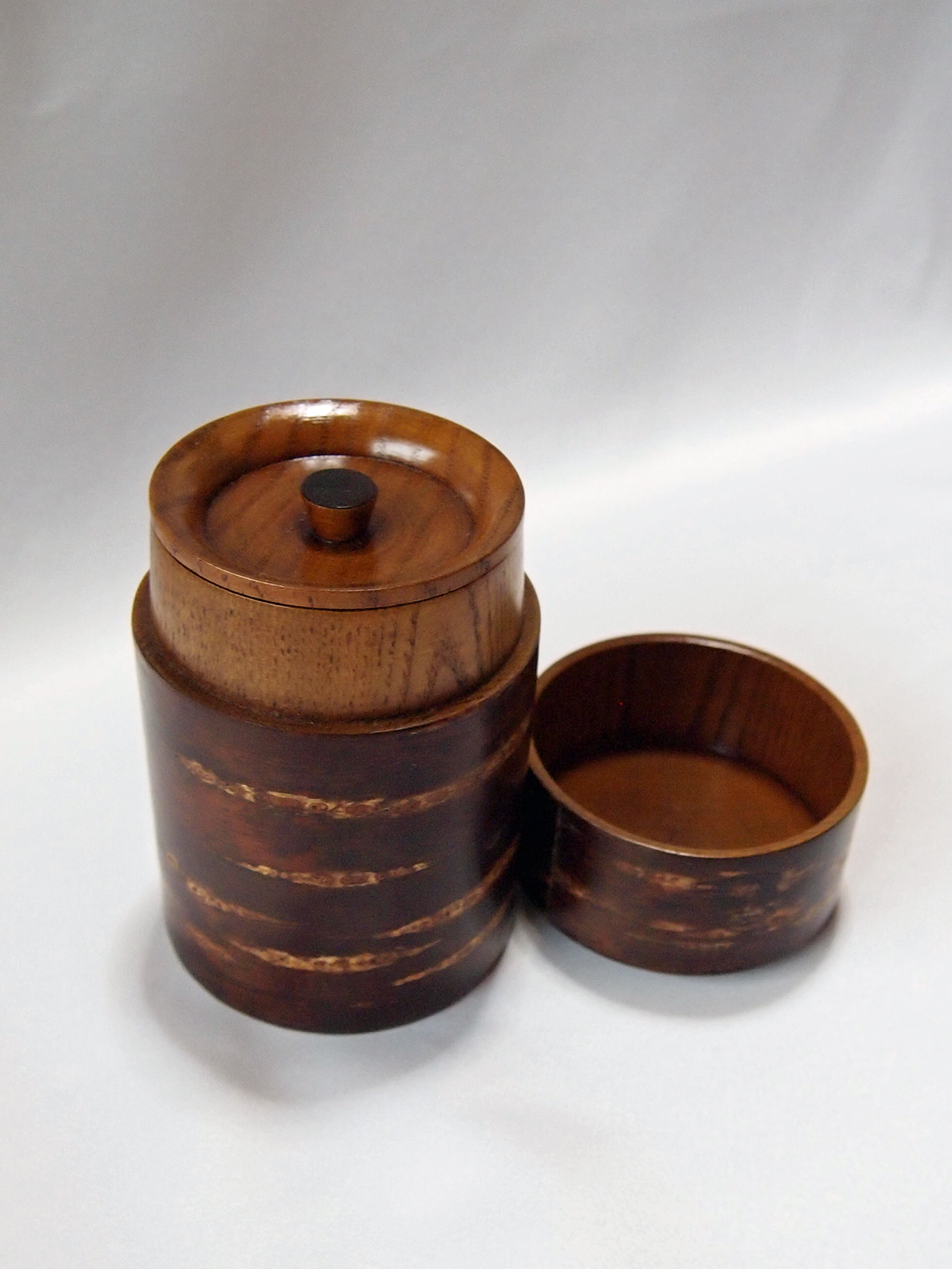 樺細工の茶筒です。